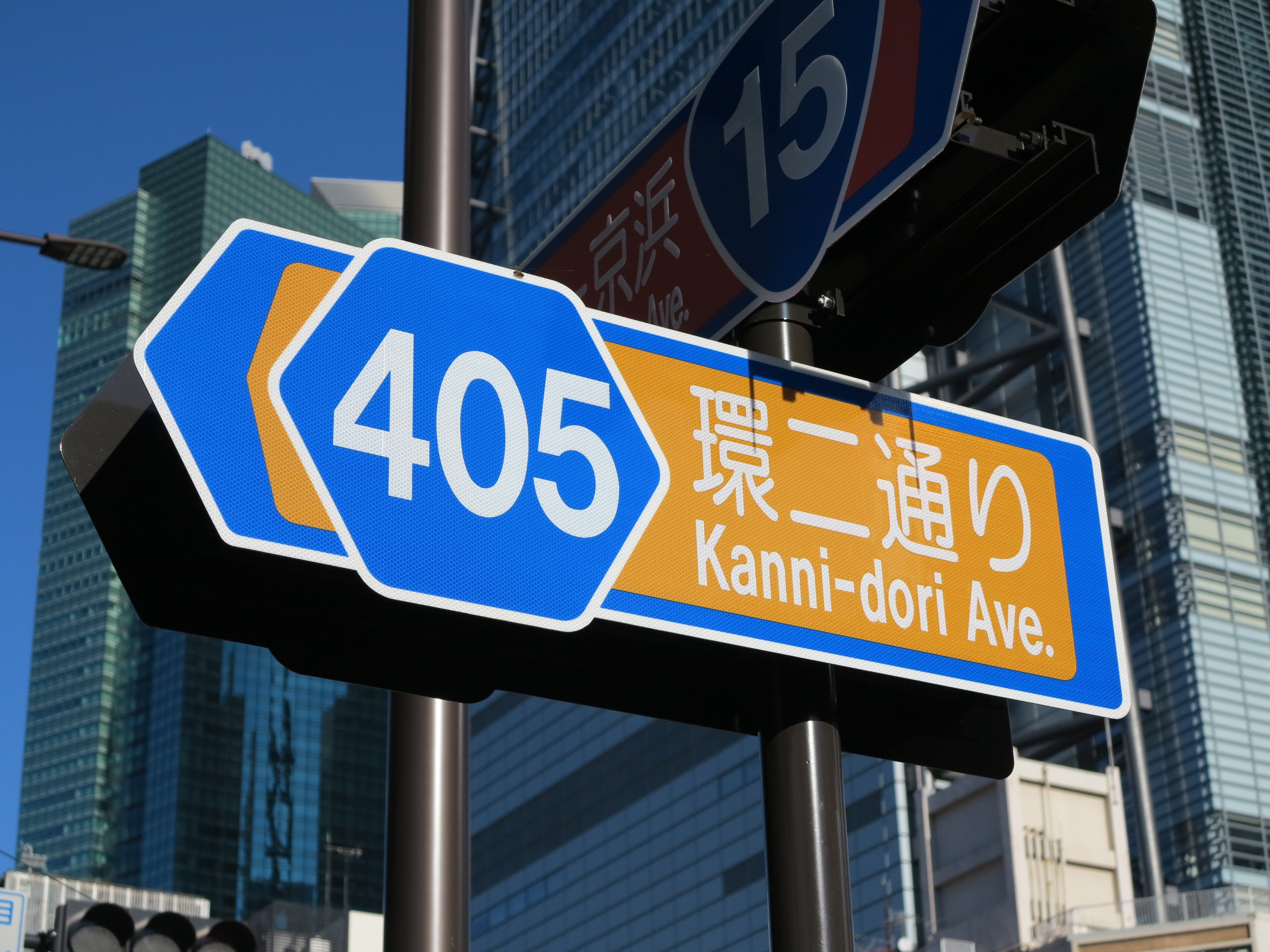 都道405号環二通りの名称表示板